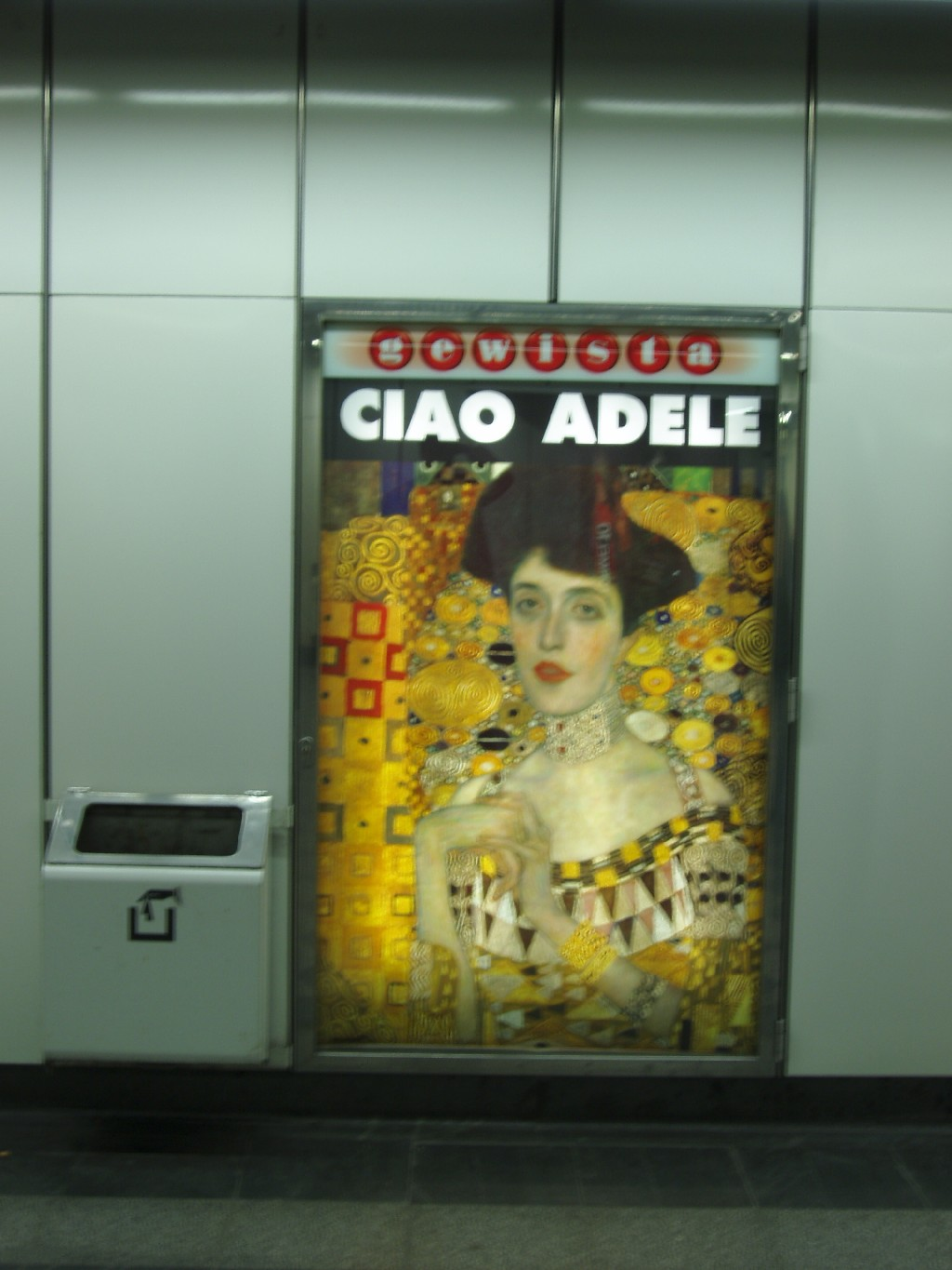 golden Adele/Klimt